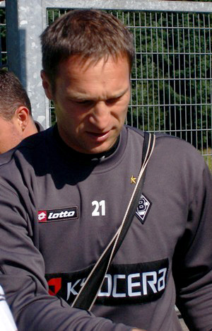 Uwe beim Training